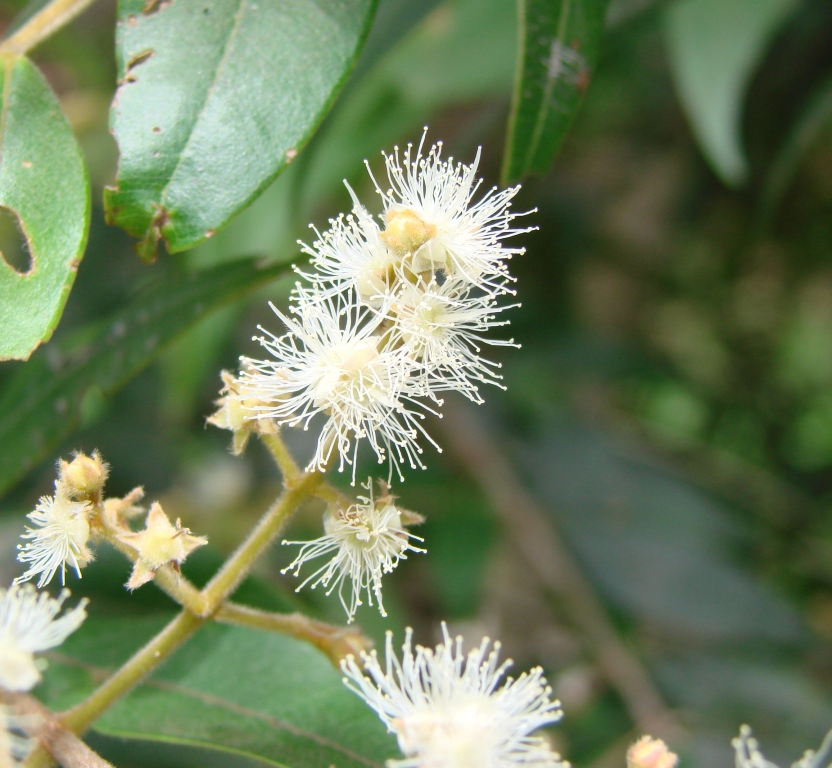 Myrcia rostrata - MYRTACEAE Parque Olhos D´Água - Brasília - Distrito Federal - Brasil.